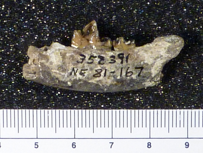 Leptocyon vafer - fossil Canidae from Miocene